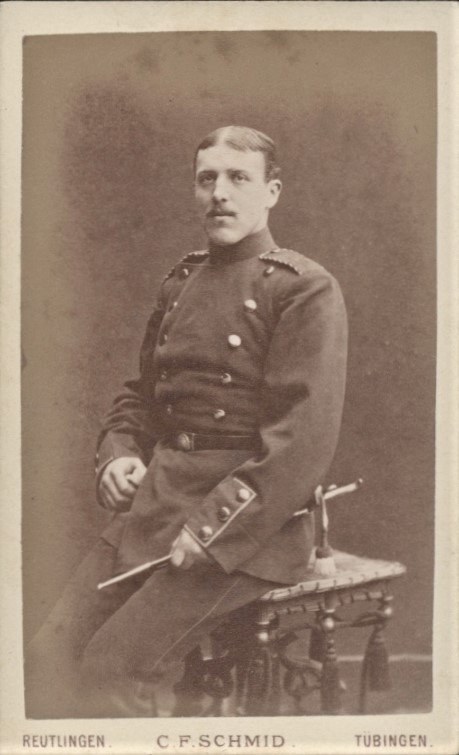 Gustav Schneider als Student Corps Suevia in Tübingen (Carte de visite, Größe ca. 10 cm × 6 cm). Im KCL 1930 Corps-Liste 130, Jahr 1878, Nr. 309: Schneider, Gust[av], xx., Reg[ierungs]Präs[ident] Tübingen